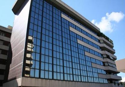 Orga Systems, Rome, viale Salvatore Rebecchini